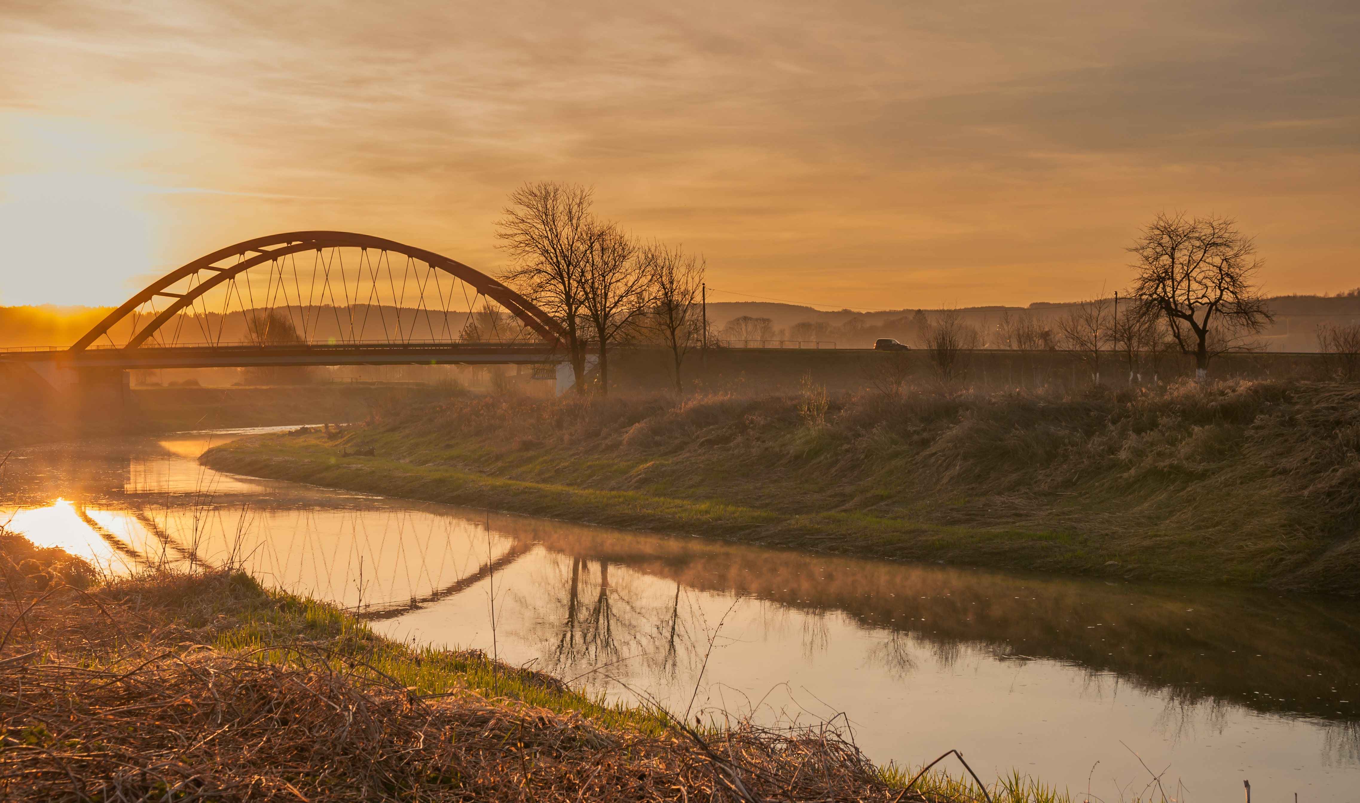 Most